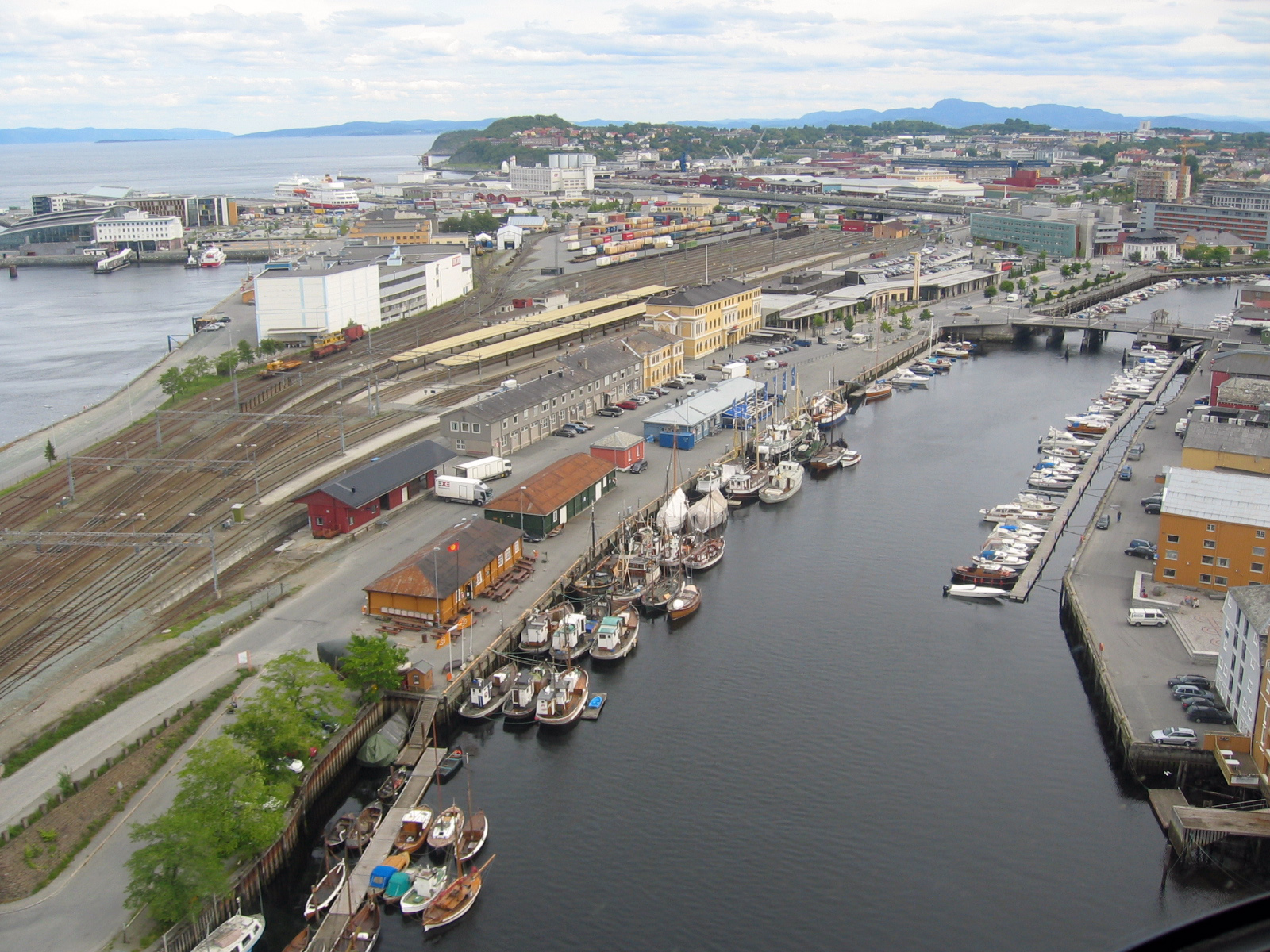 Fosenkaia